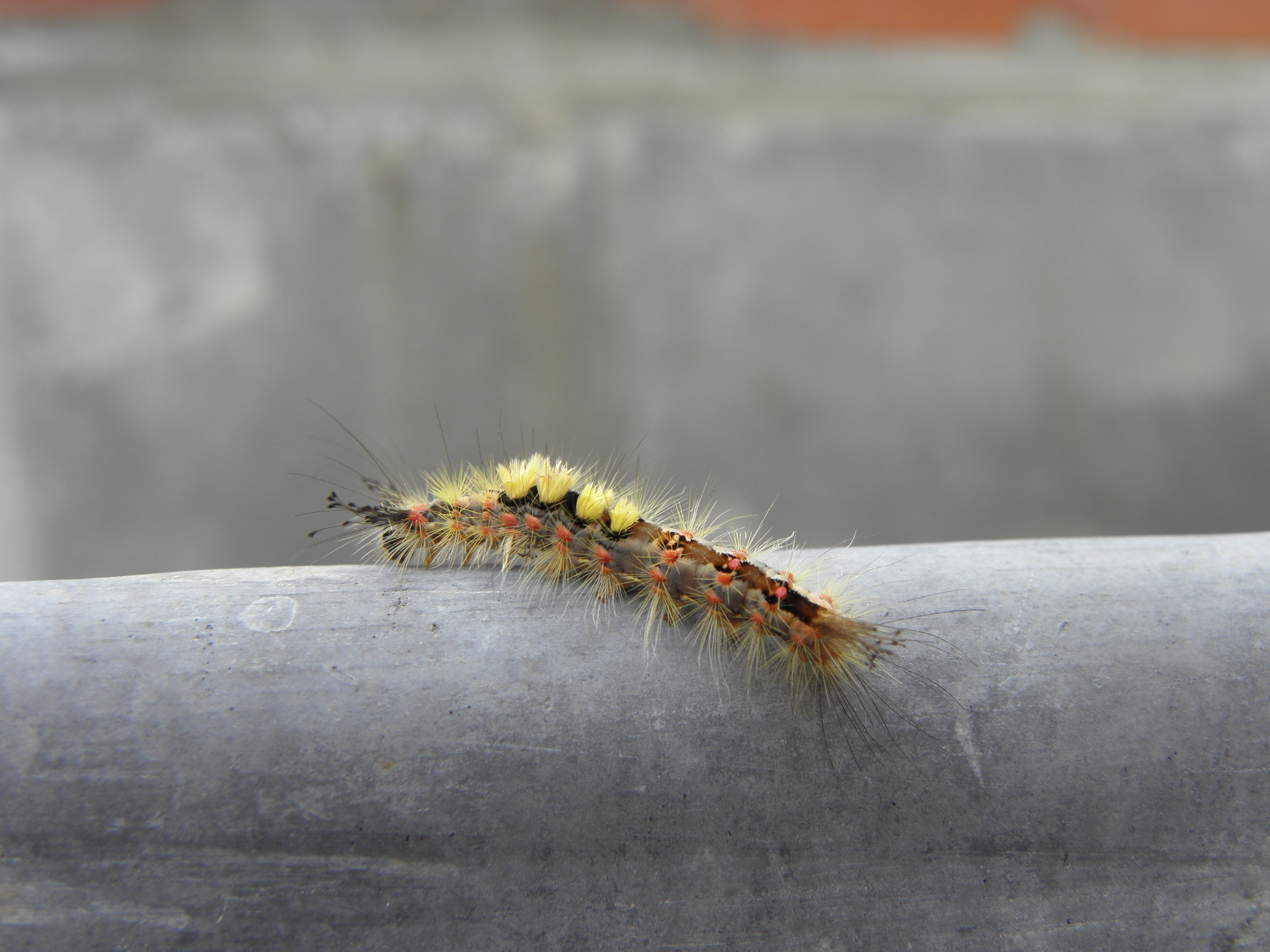 Chenille